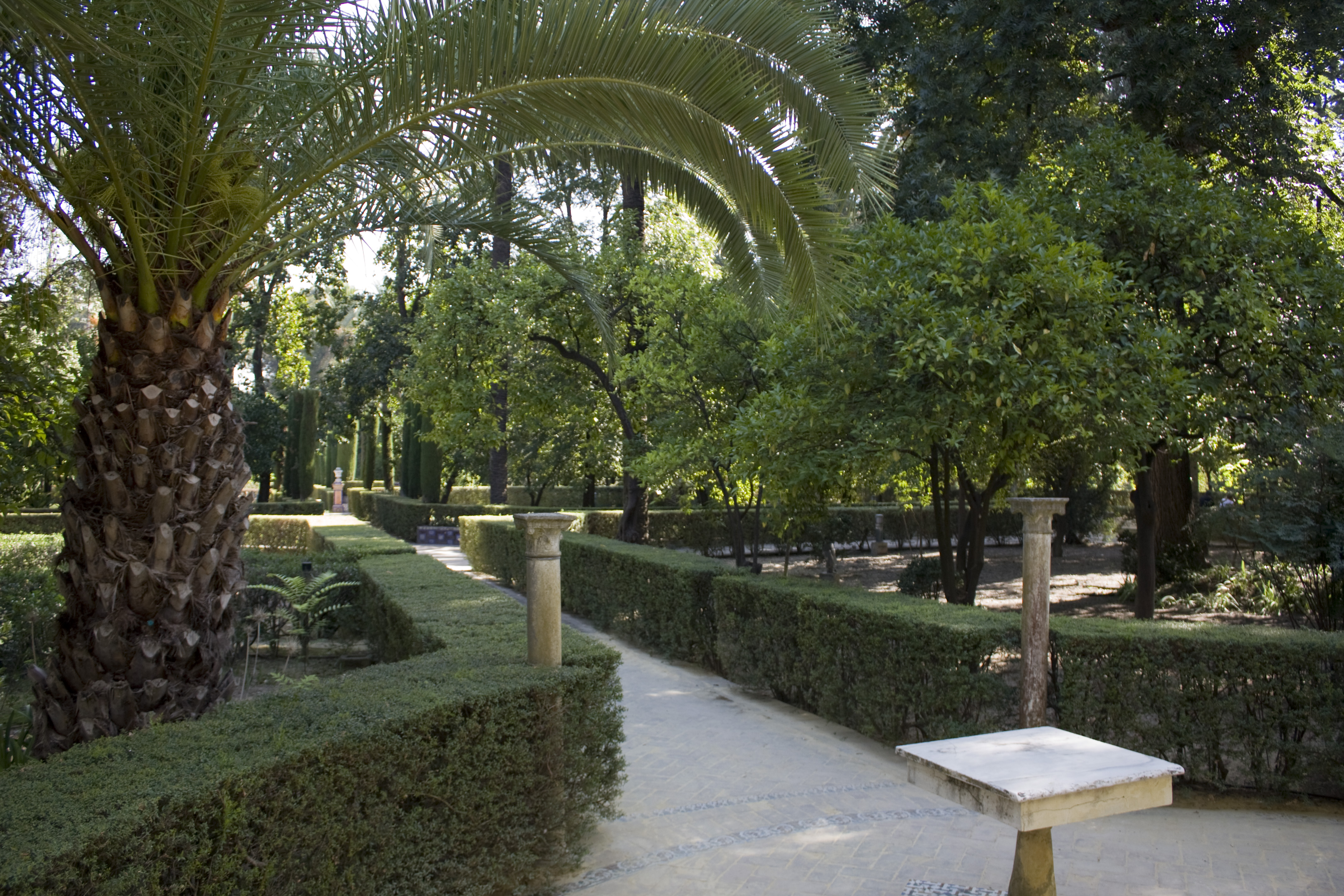 Garden of the Marquis de la Vega Inclán.